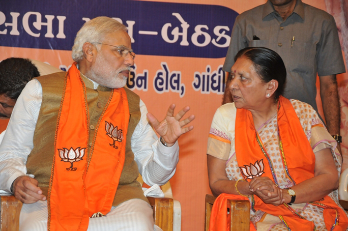 Narendra Modi and Anandiben Patel attending BJP MLAs meeting.